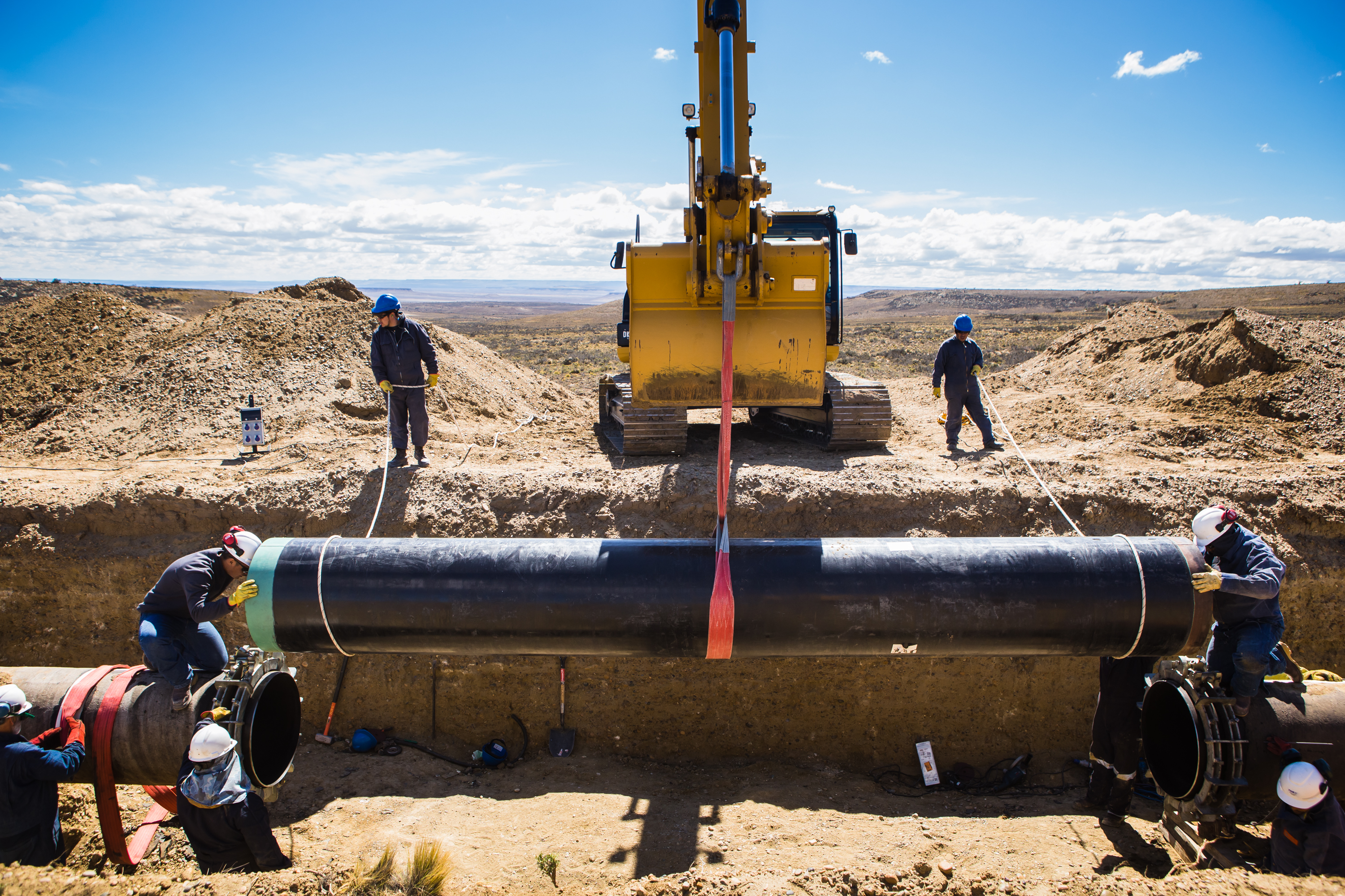 Imagen de las obras de TGS